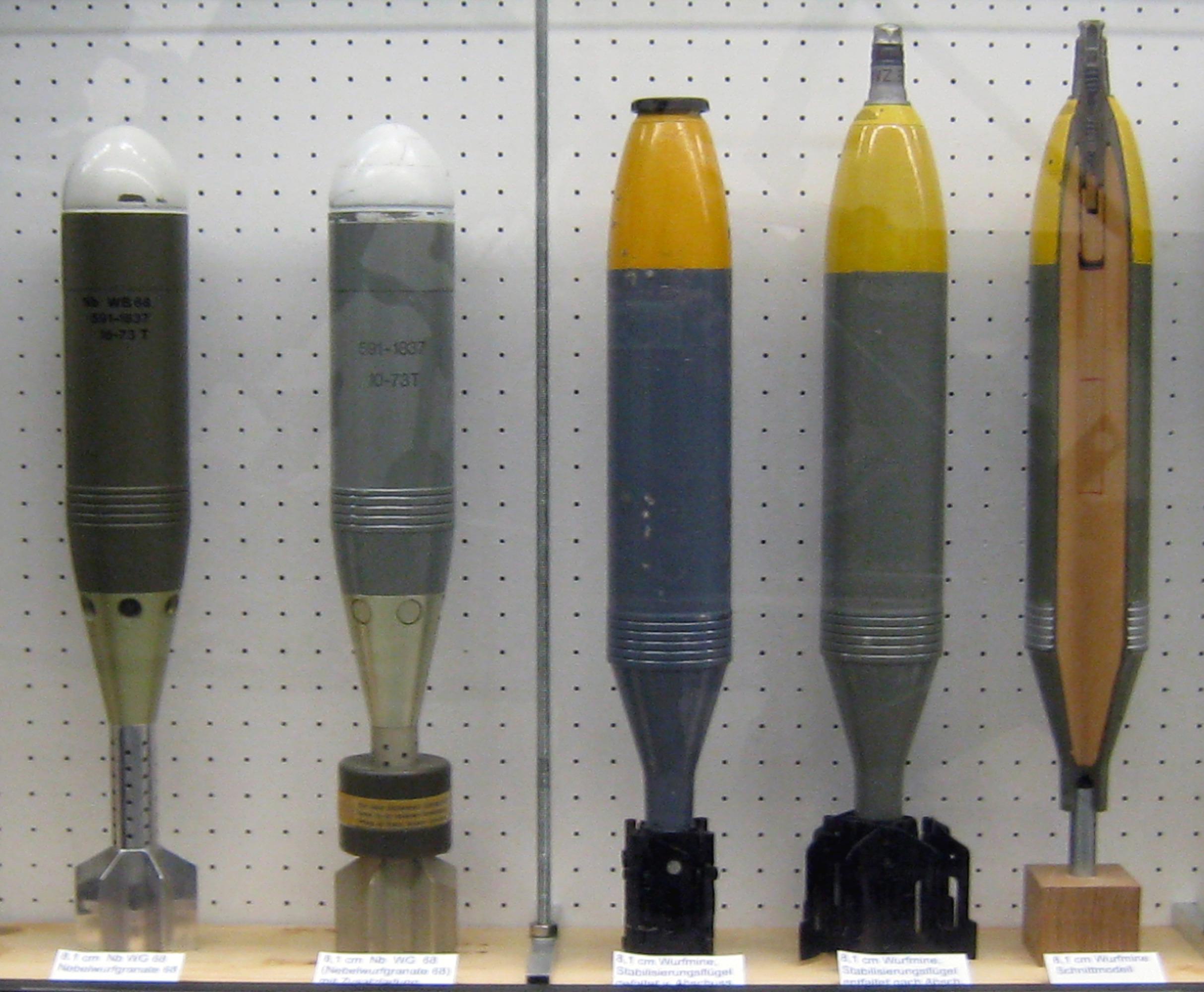 Munition für 8,1 cm Minenwerfer der Schweizer Armee, fotografiert in der Festung Heldsberg, St. Margrethen, Kanton St. Gallen. V.l.n.r.: Nebelwurfgranate 68 ohne und mit Zusatzladung, Wurfmine (zweimal), Wurfmine Schnittmodell